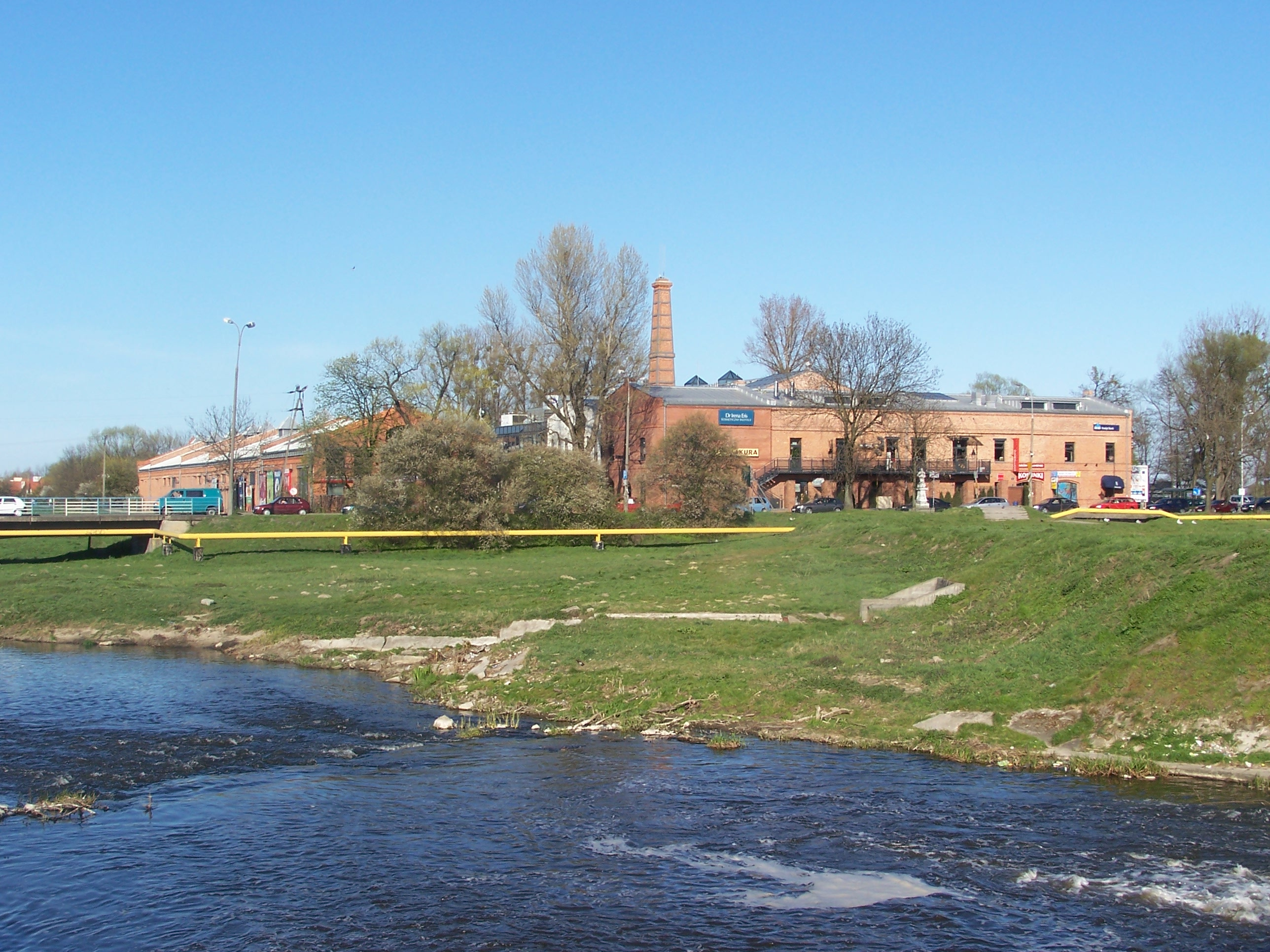 Stara papiernia, Konstancin-Jeziorna, widok zza Jeziorki.